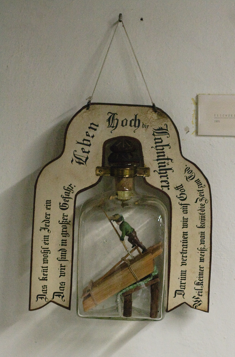 Tischzeichen der Ladenkarlfahrer (Lahnführer) von 1875 im Museum der Stadt Steyr (Eing'richt oder Geduldsflasche)